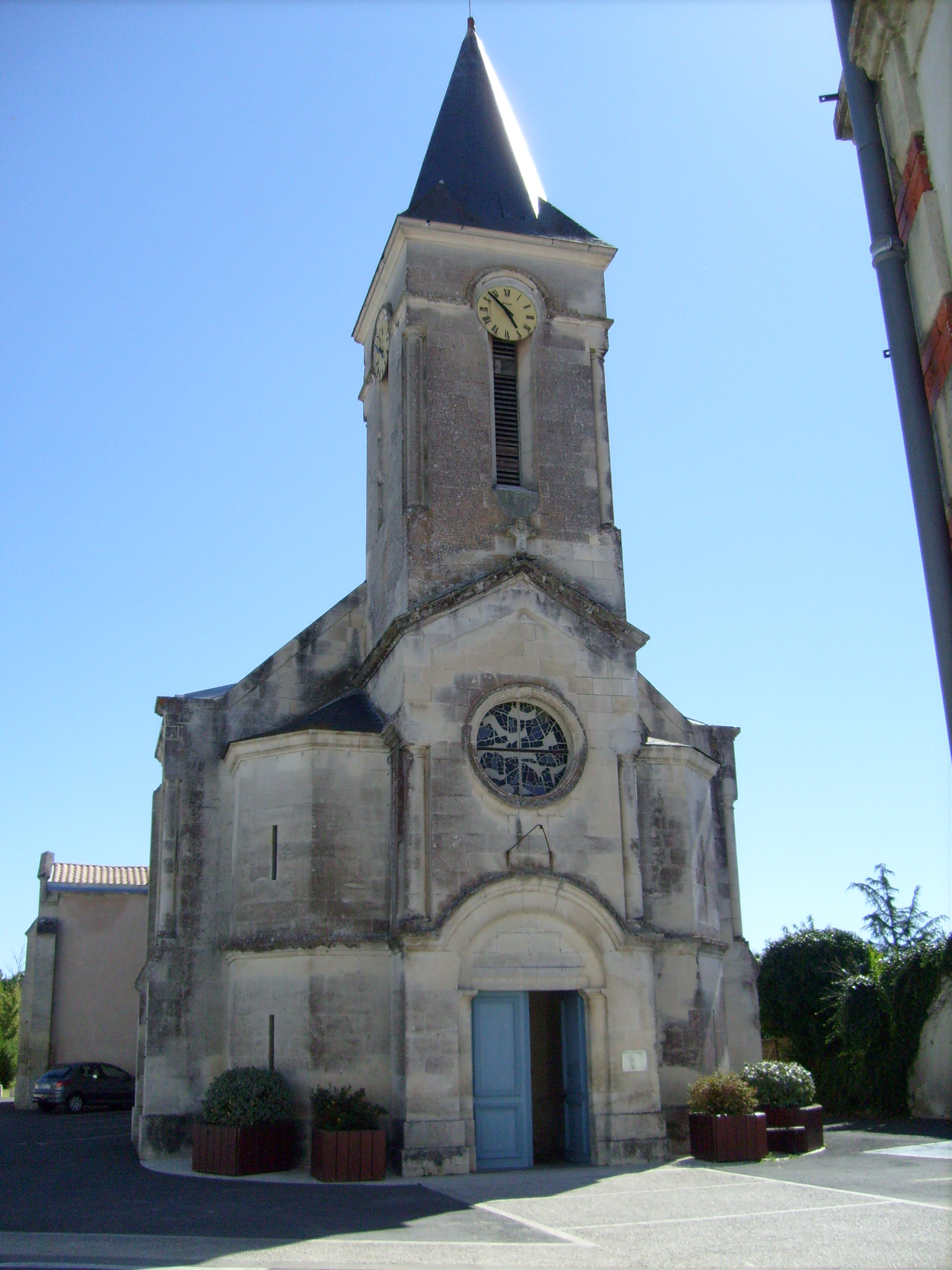 La façade de l'église d'Etaules, en Charente-Maritime